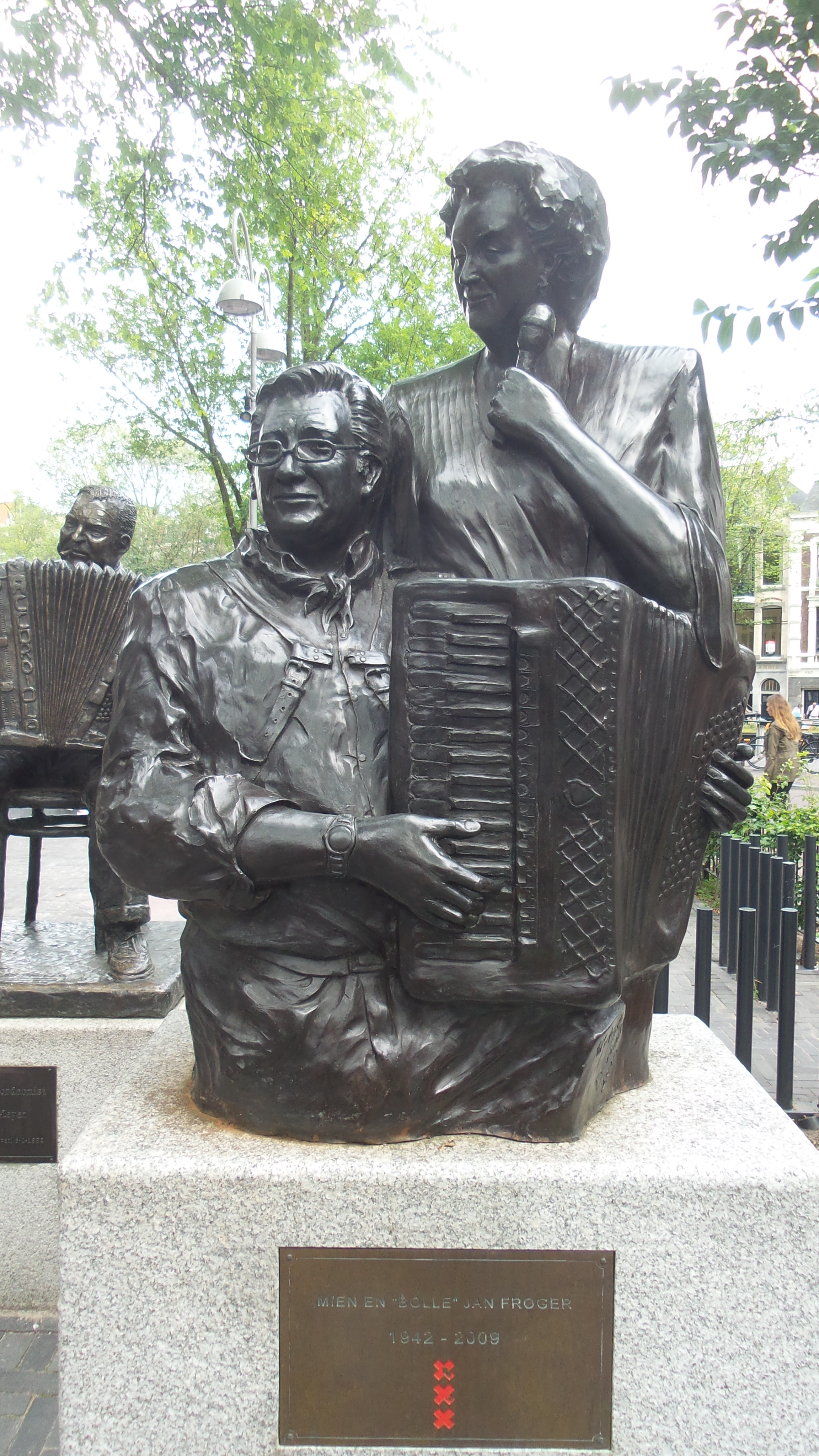 Beeld van Bolle Jan en Tante Mien (Froger) gemaakt door Dominic Grant op het Johnny Jordaanplein / Elandsgracht in de Jordaan in Amsterdam , geplaatst op 5 november 2010